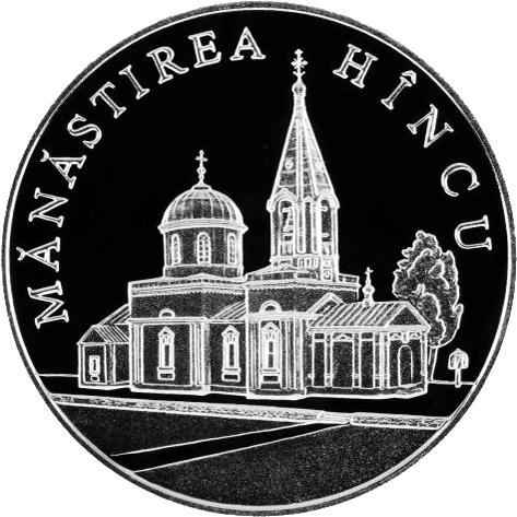 Реверс памятной монеты "Хынковский монастырь"